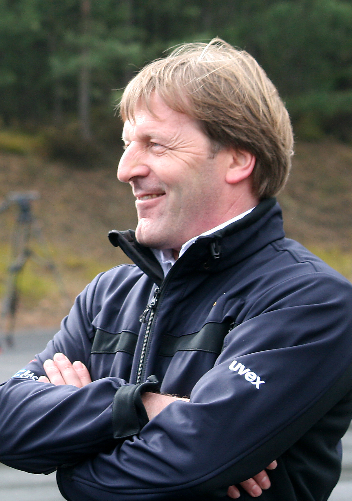 Joachim Winkelhock, ehemaliger Autorennfahrer, als Fahrtrainer im Opel Performance Center auf dem Testgelände Dudenhofen.